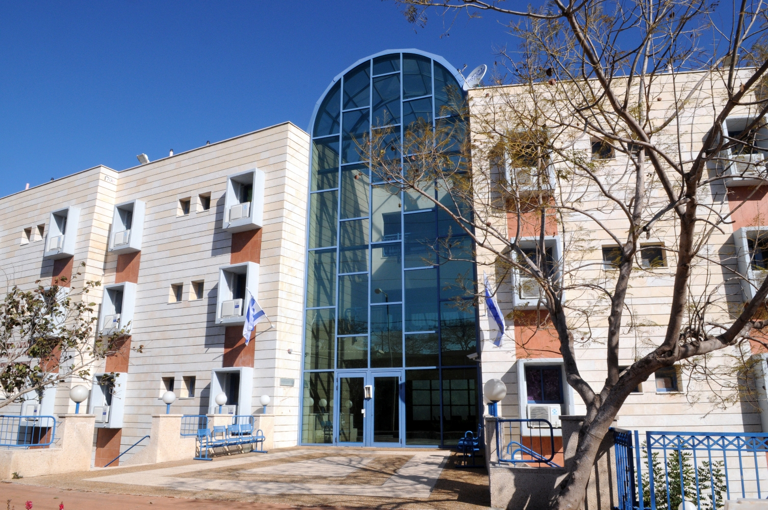 מגורי סטודנטים באוניברסיטת אריאל